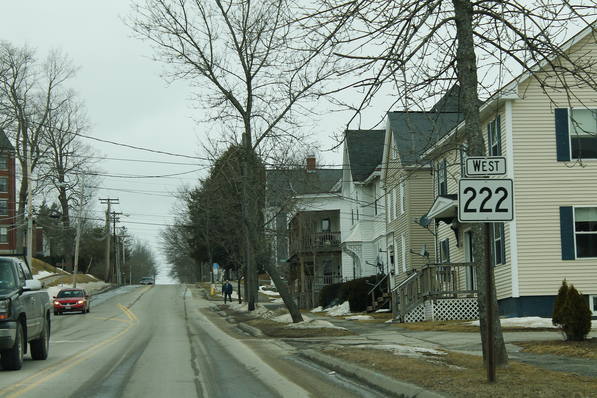 ME222wRoadSign-Bangor